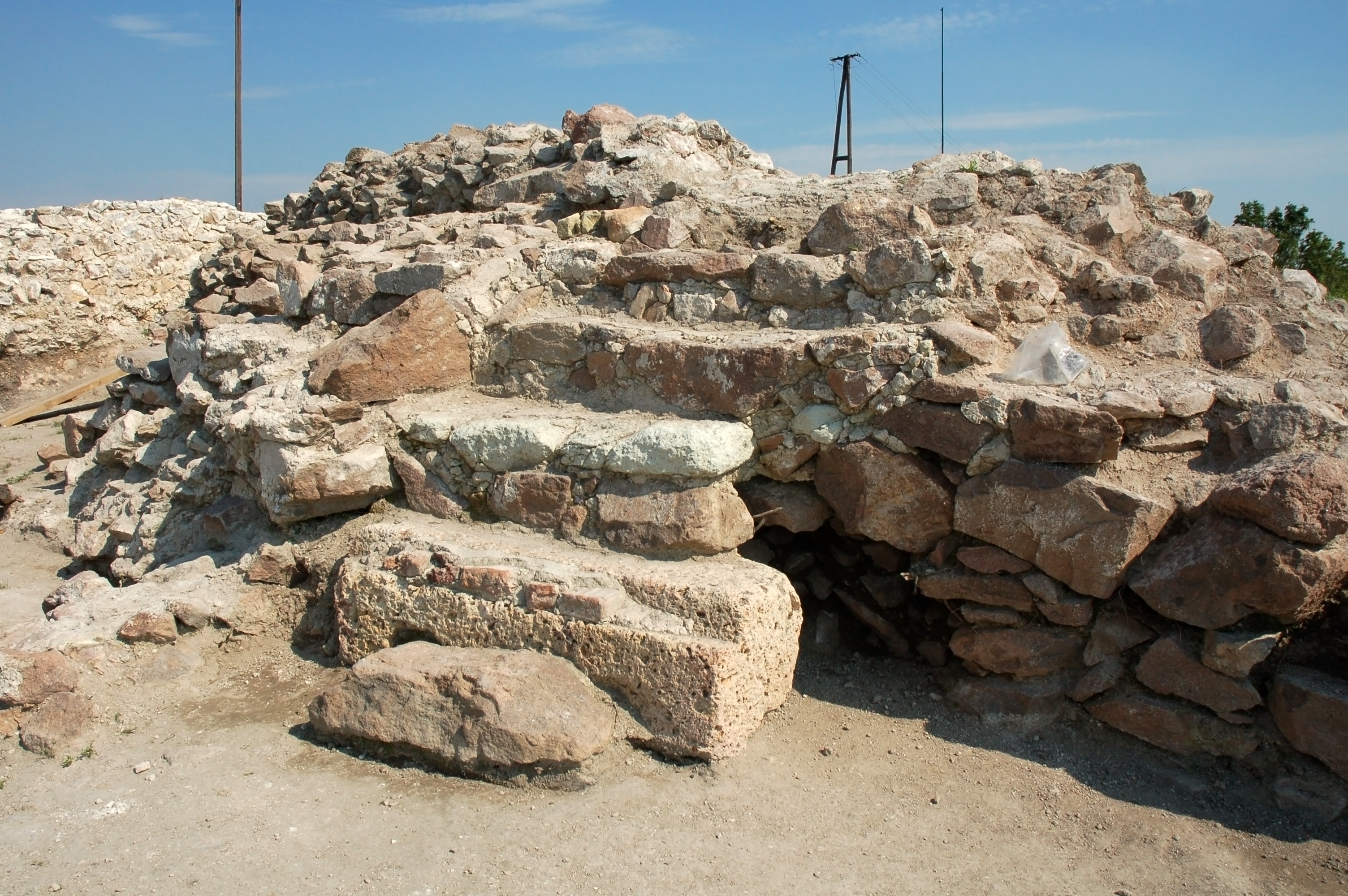 A Sátoraljaújhelyi vár feltárásának állapota 2010-ben. Lépcsőmaradvány a vár nyugati felében.